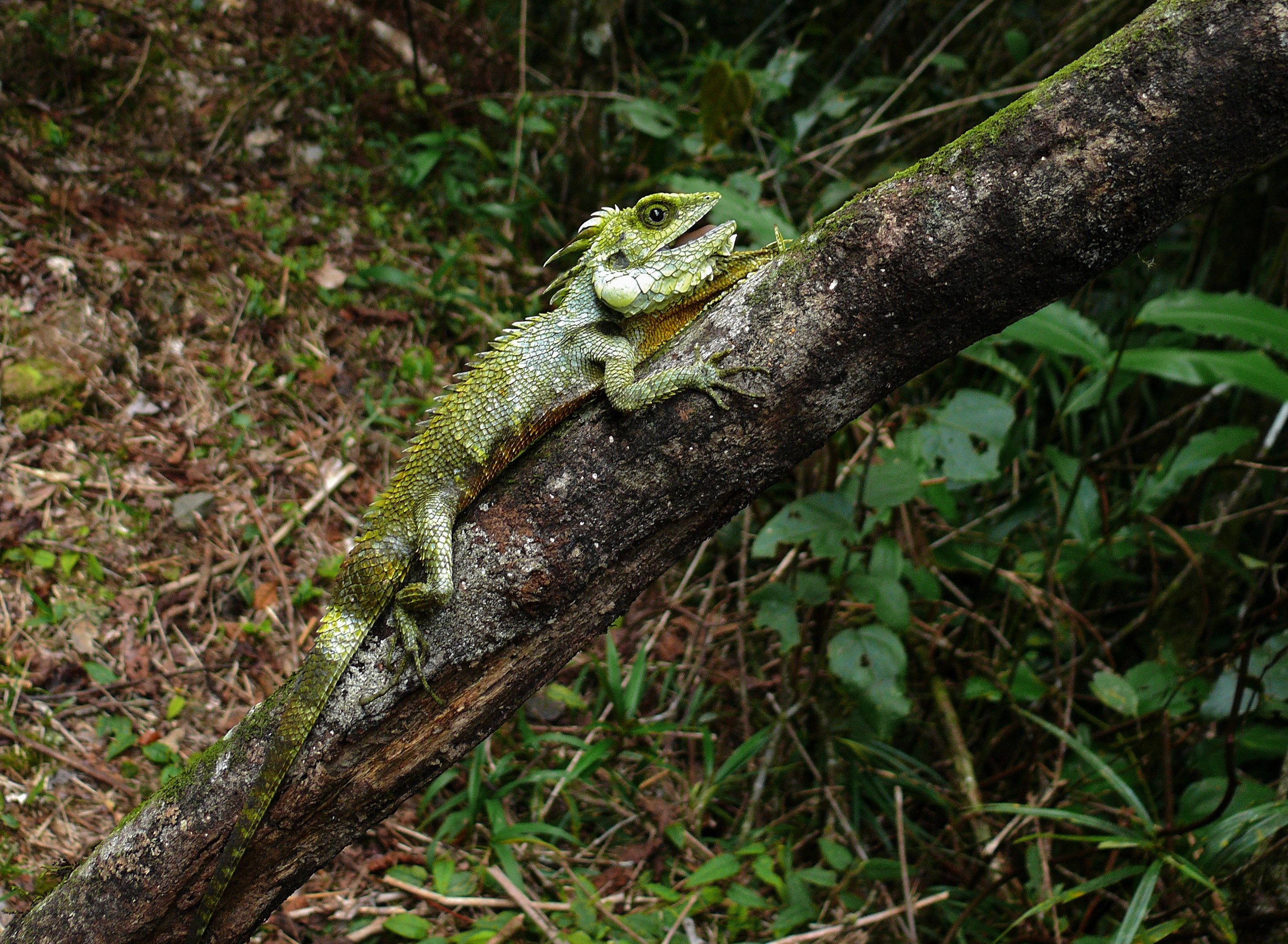 Mount Kinabalu NP, Sabah, MALAYSIA